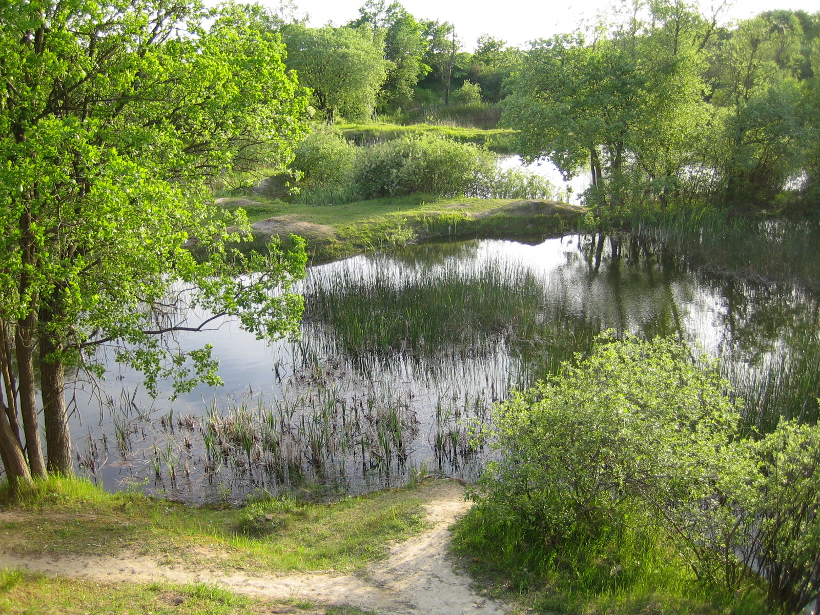 Foto av dammar i Käglingeparken. Bilden tagen av mig själv 29 maj 2005.